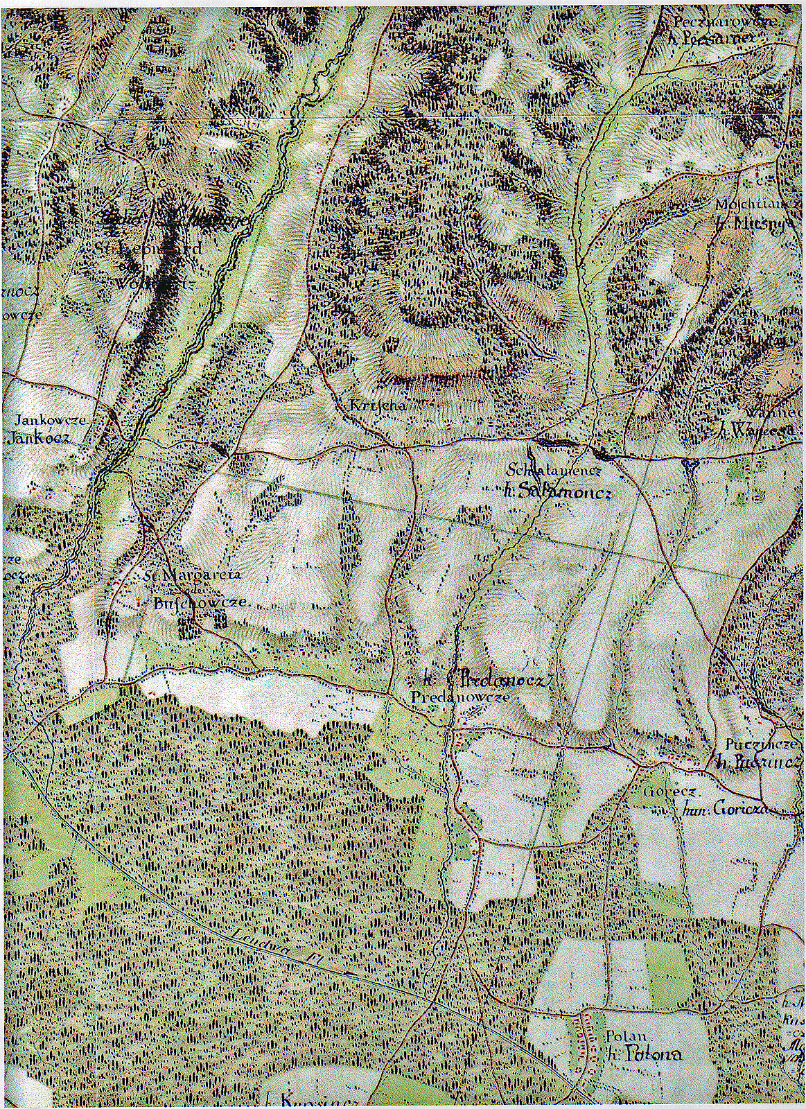 Prvi vojaški zemljevid Prekmurja iz leta 1763 - 1787 Gorecz,Goricz Slovenija Slovenia